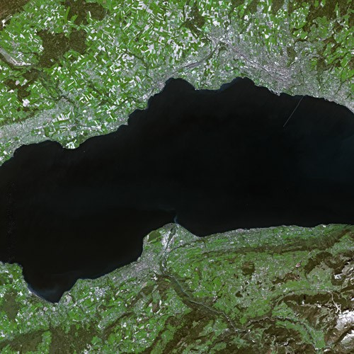 Lake Geneva by SPOT Satellite